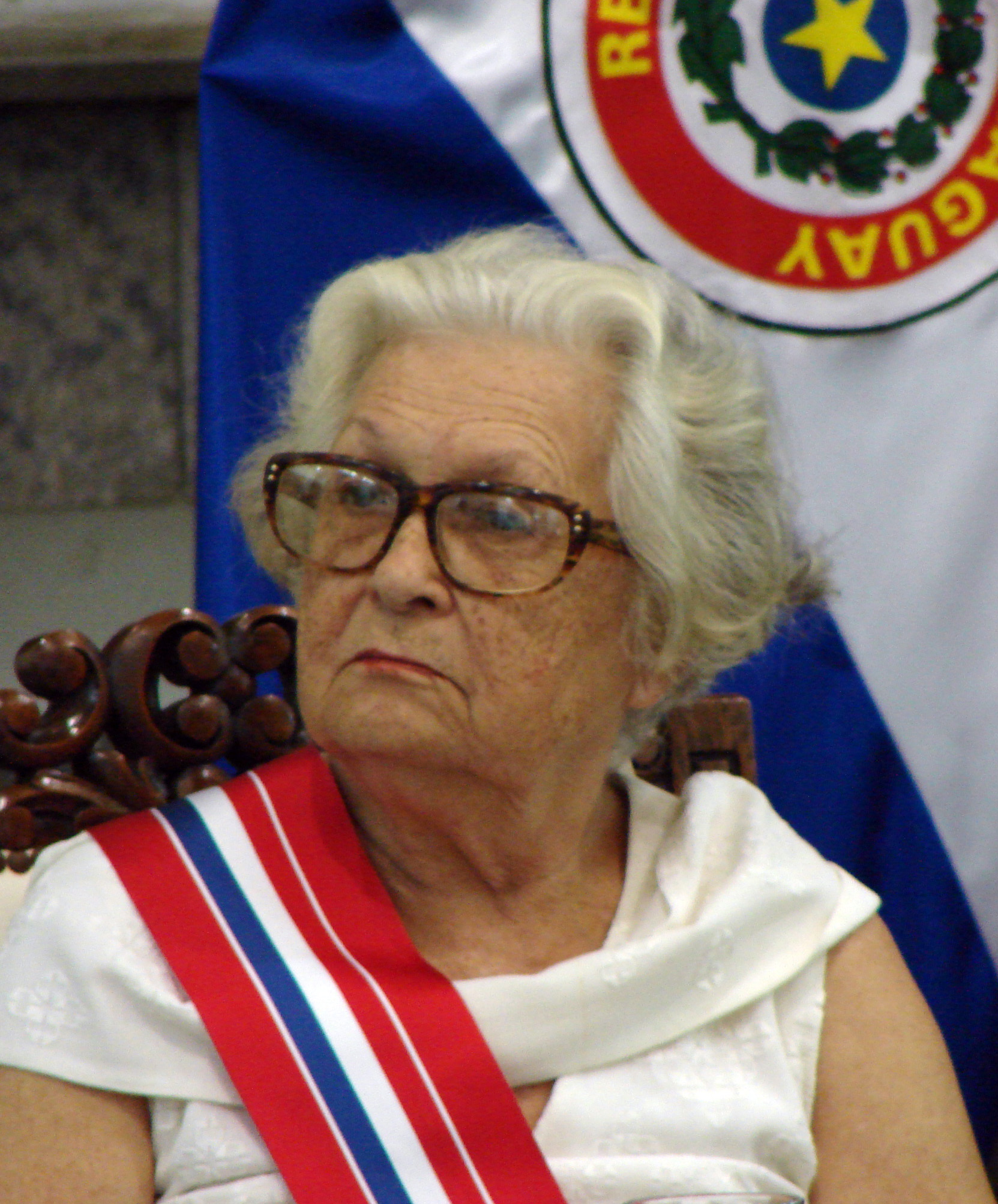 Fotografía del momento en que Lotte es condecorada con la Orden Nacional del Mérito en el Grado de Gran Cruz otorgada por el Gobierno paraguayo. La fotografía fue tomada por mí en el evento.